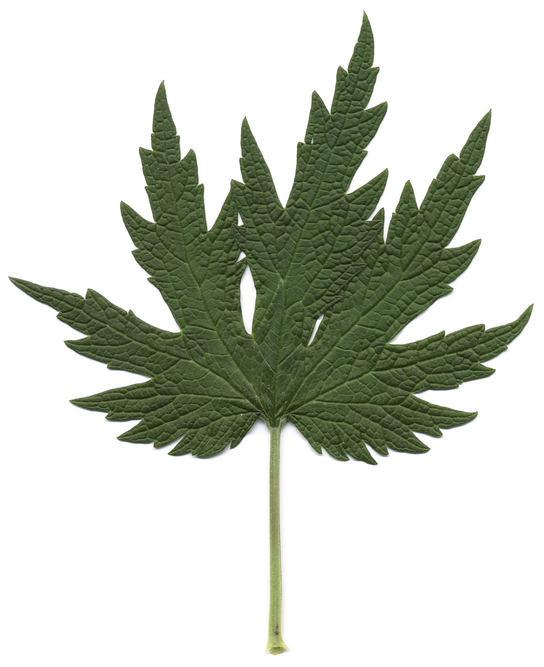 Leonurus cardiaca - leaf (scan)